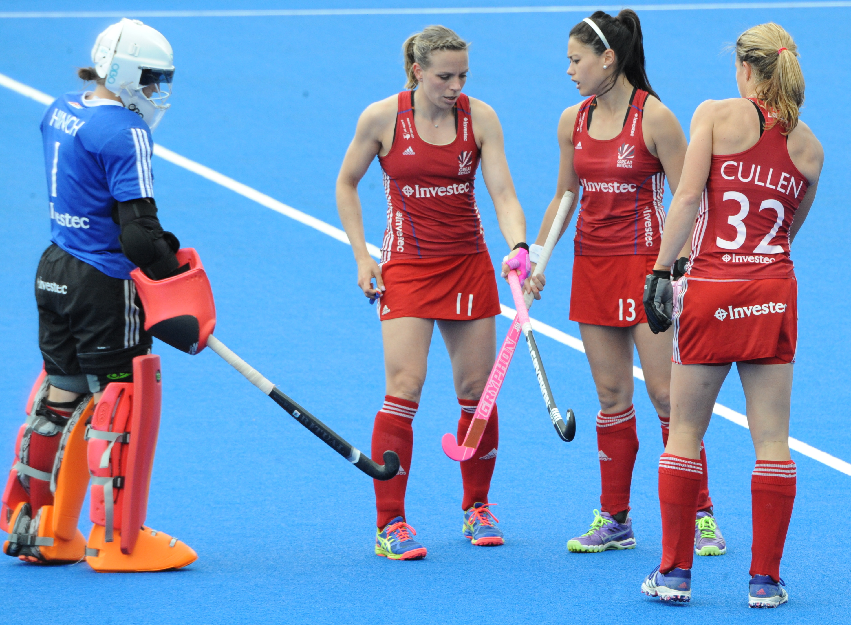 GB v Argentina 2016 CT